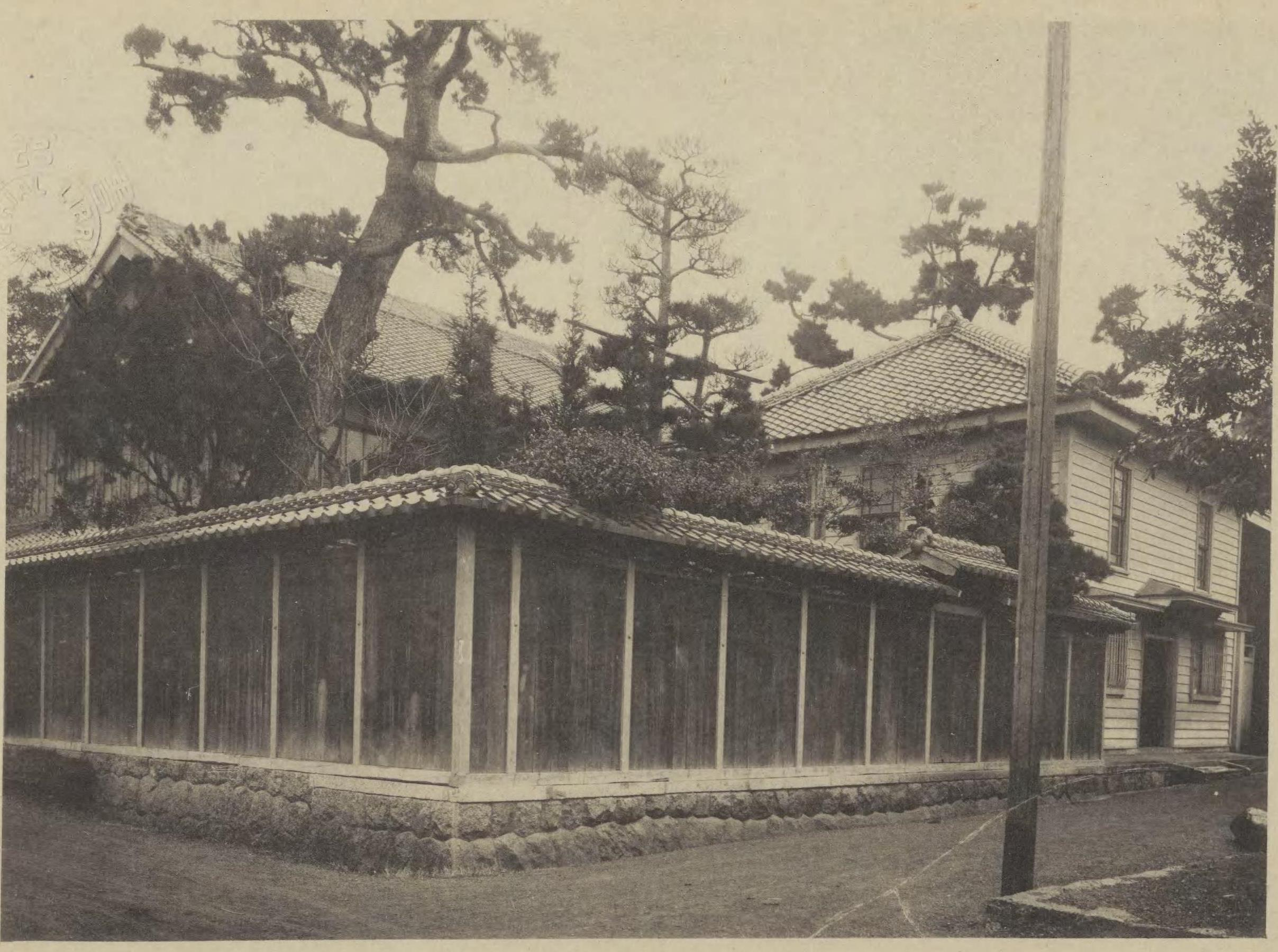 大垣新田藩畠村陣屋跡地に建てられた福井造酒場（豊橋市の福井酒造の前身）。『渥美郡勢総覧』より。昭和9年4月1日撮影。